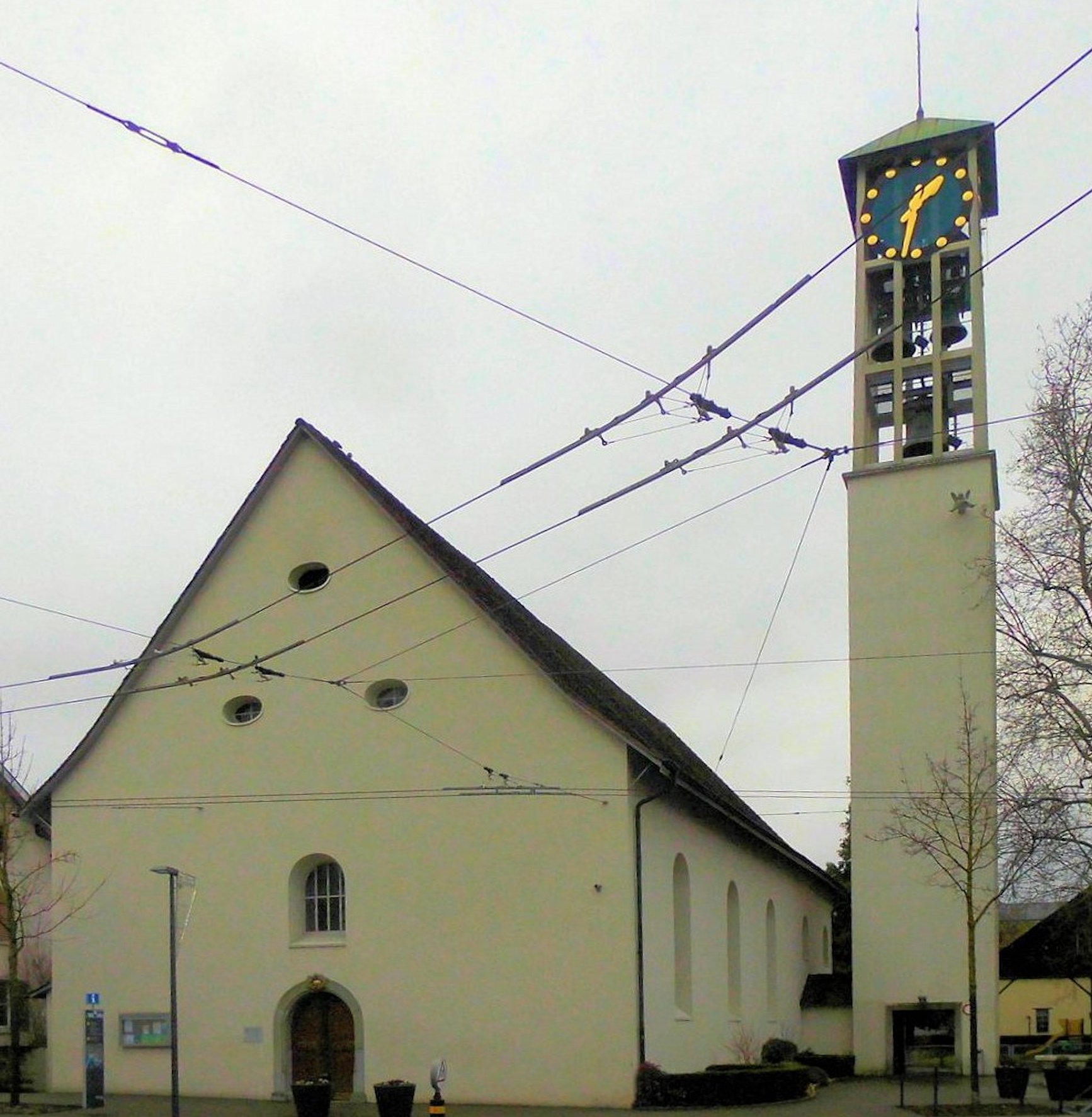 Reformierte Kirche in Neuhausen am Rheinfall, Kanton Schaffhausen, Schweiz